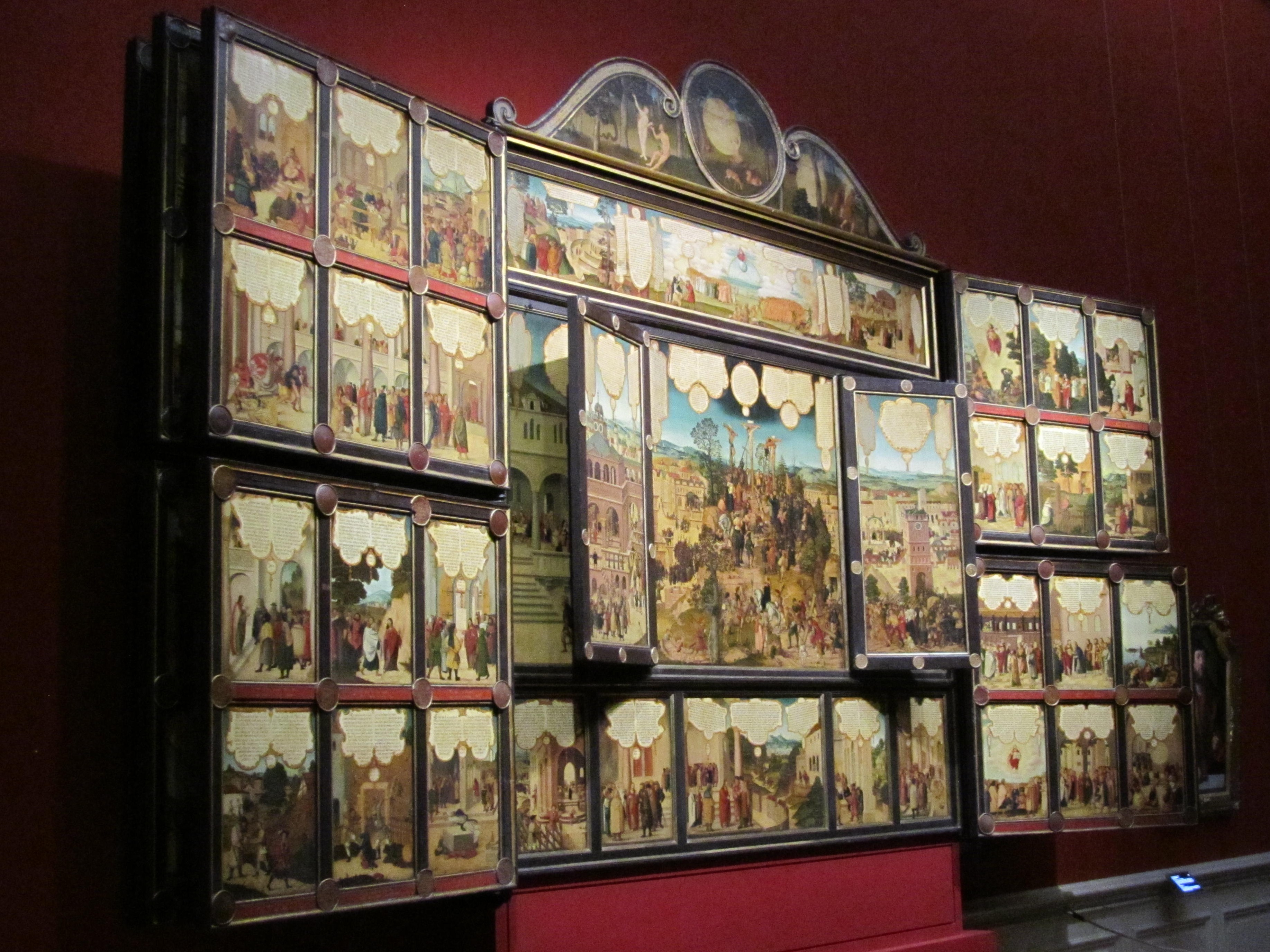 Der „Gothaer Tafelaltar“ mit 157 Einzelbildern, ausgestellt im Schlossmuseum Gotha.